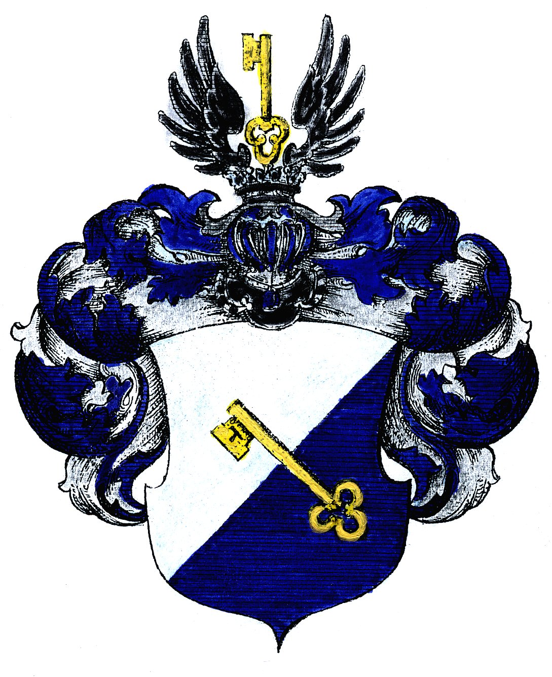 Wappenreproduktion nach Vorlage